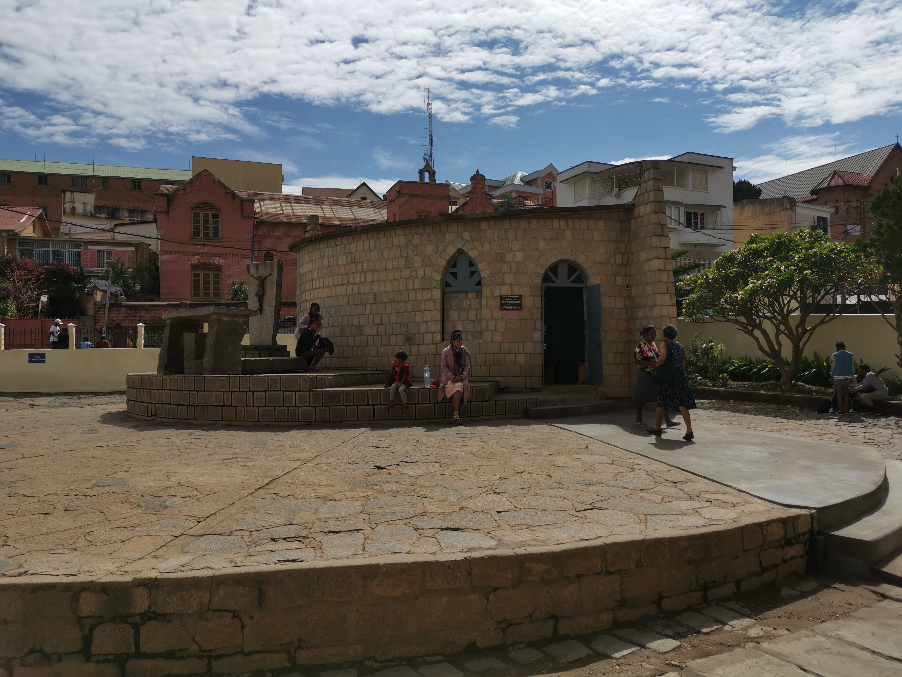 Kathedrale Marie Immaculée Conception à Andohalo